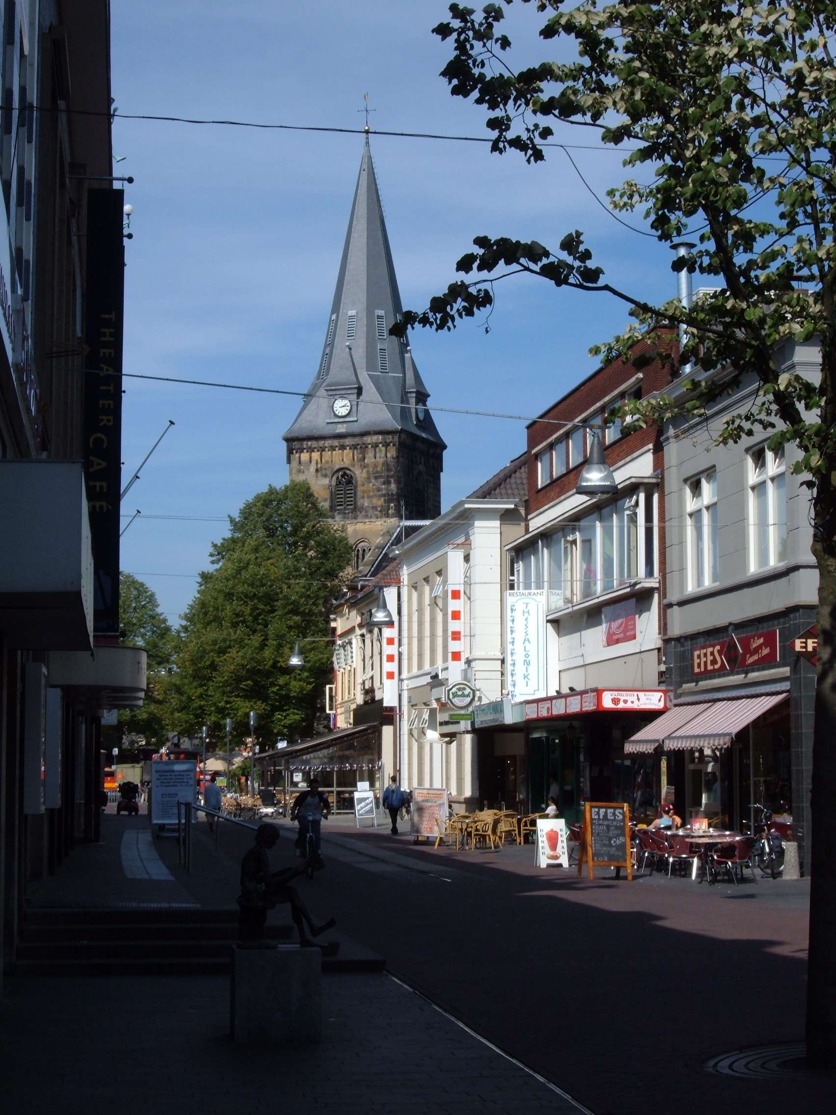 Langestraat in Enschede, Grote Kerk in the background